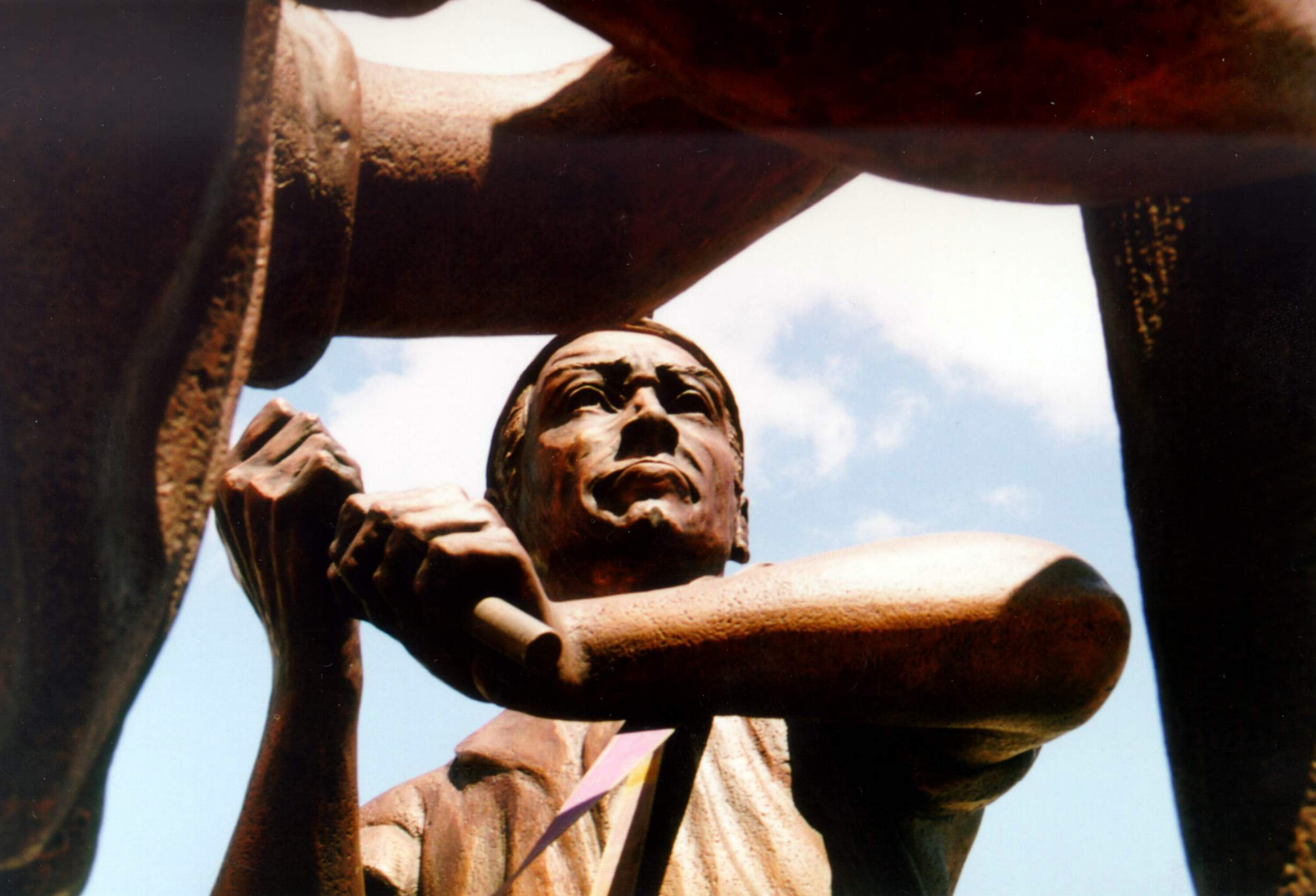 Monumento a la mineria